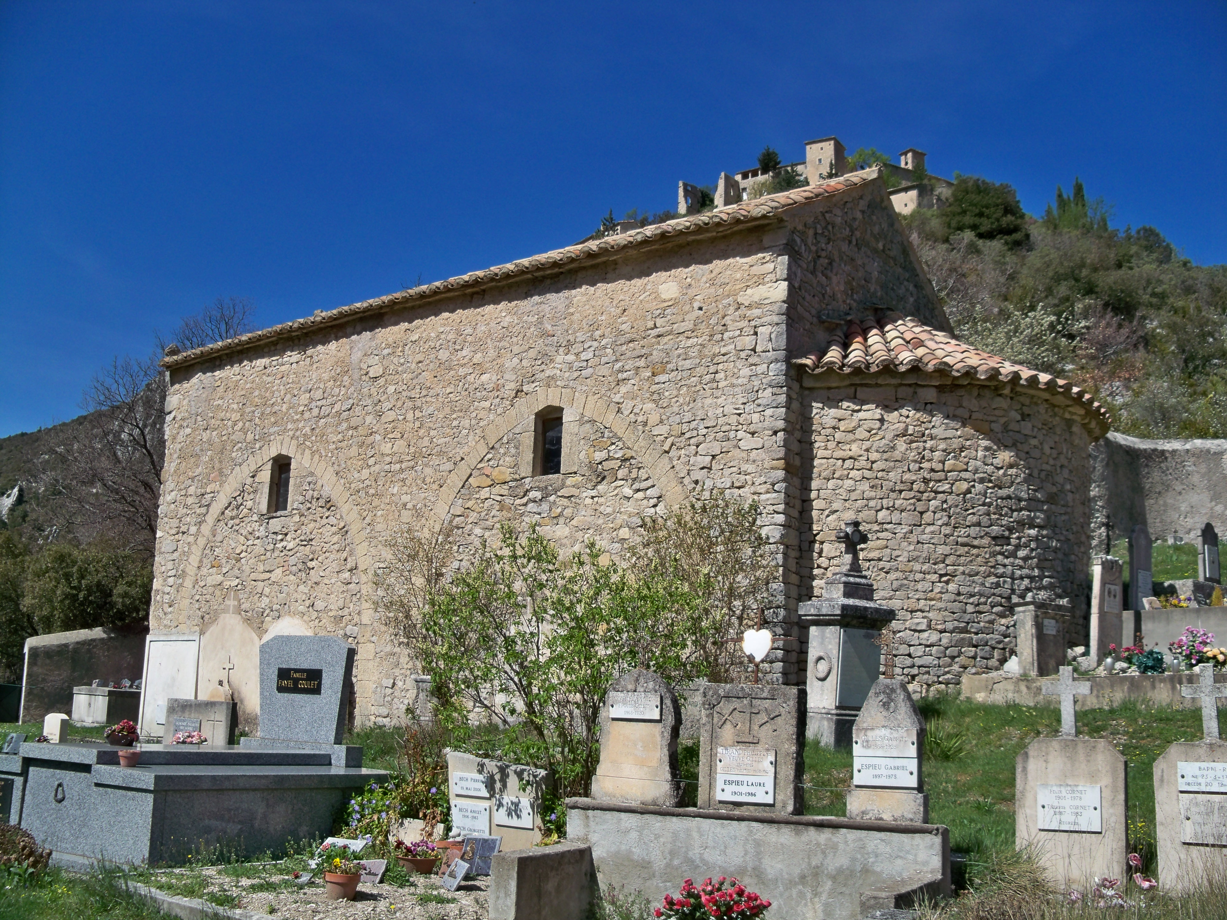 Chapelle Saint-Jean-Baptiste, à Brantes (84). En haut, au fond à droite, le bourg de Brantes.